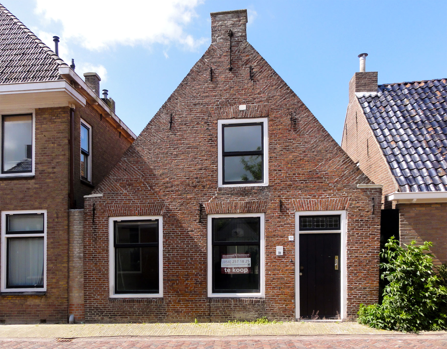 Nije Buorren 13 in Ferwerd